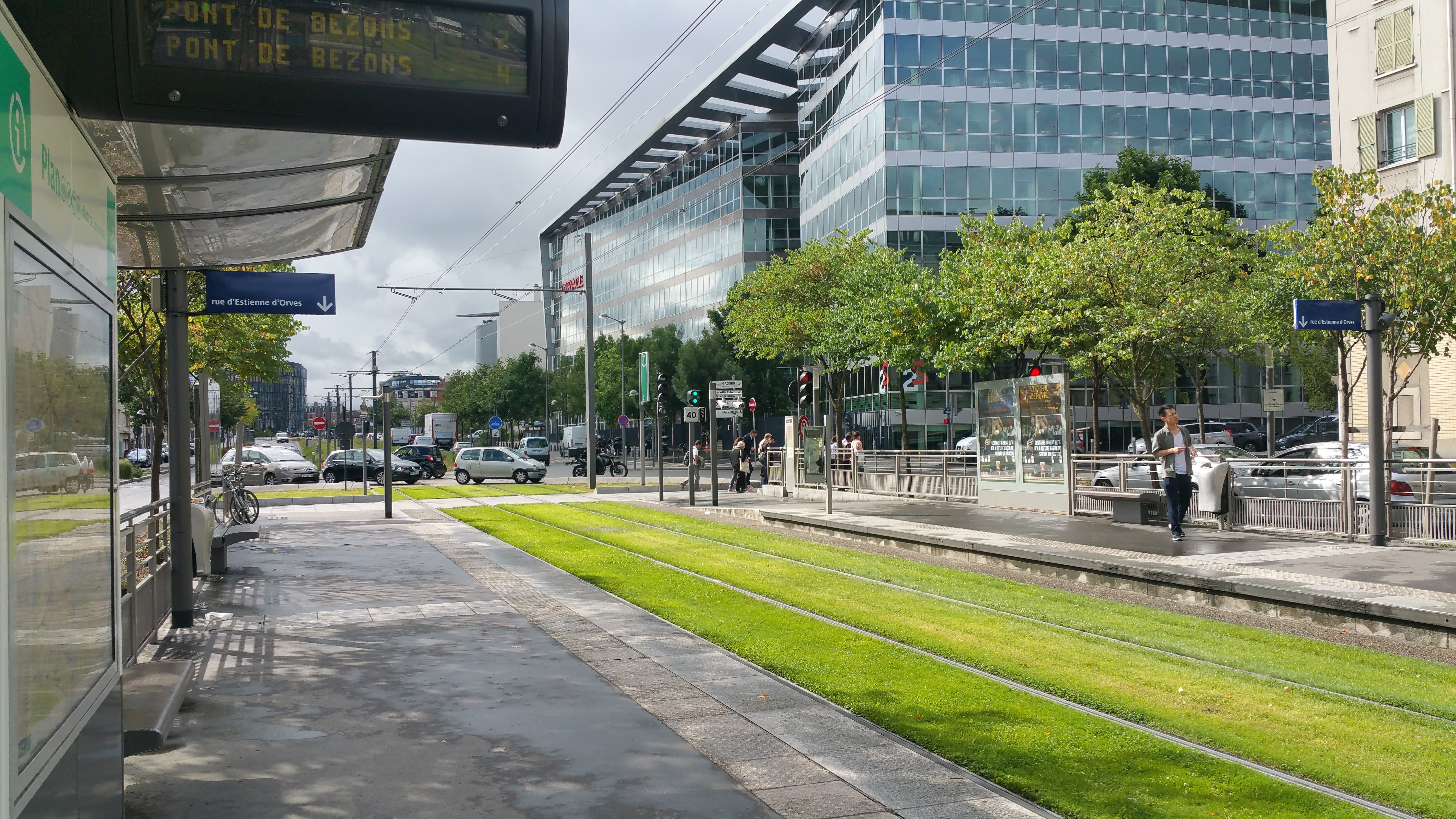 Station de Tram à Colombes et locaux Oracle France - Tram T2 - Tramway